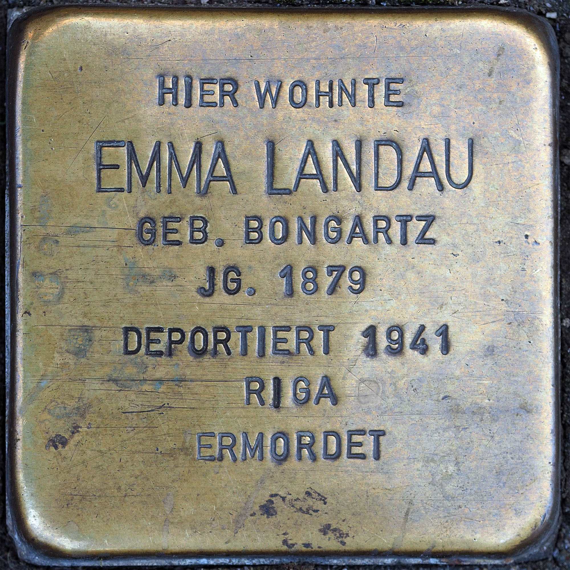 Stolpersteine Wesel: Landau, Emma